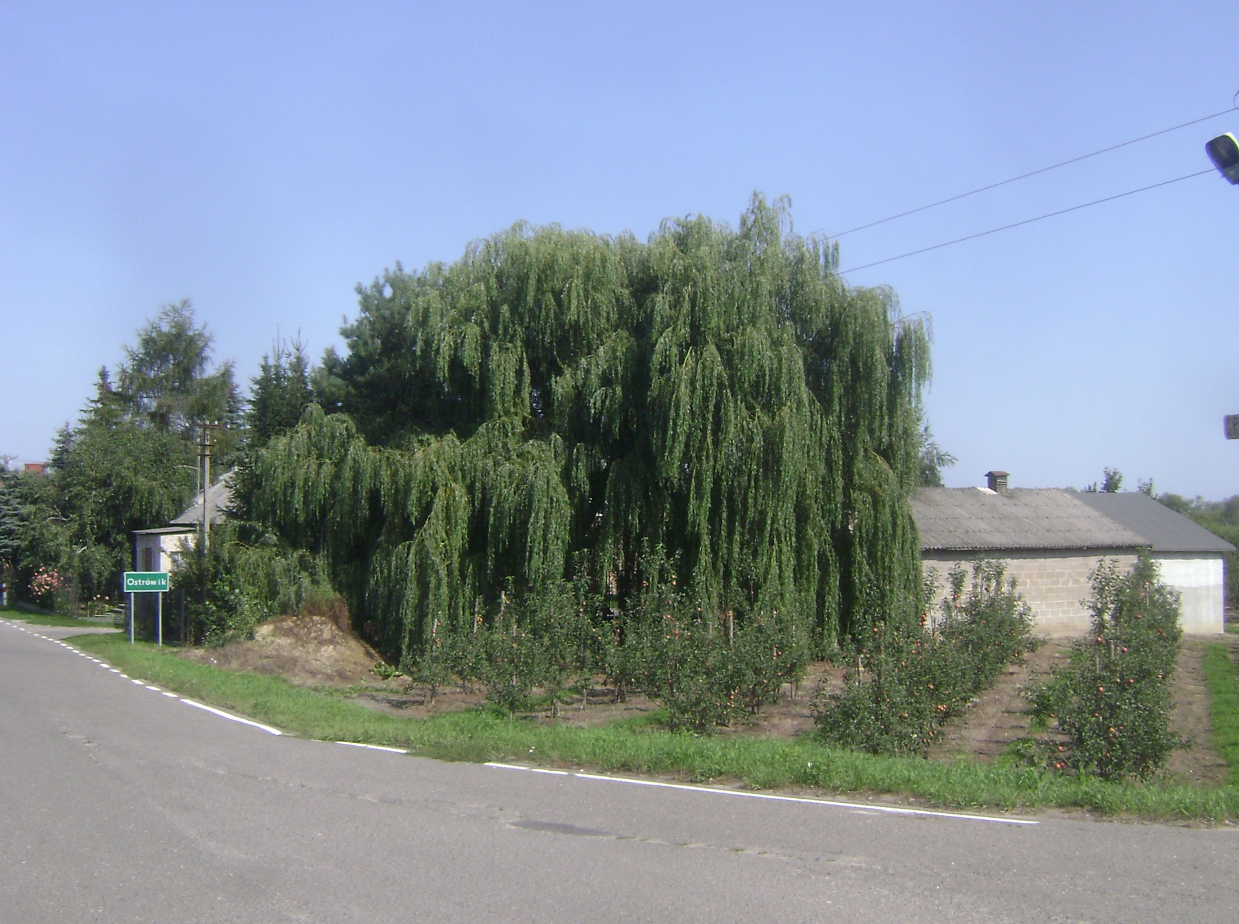 Wieś Ostrówik